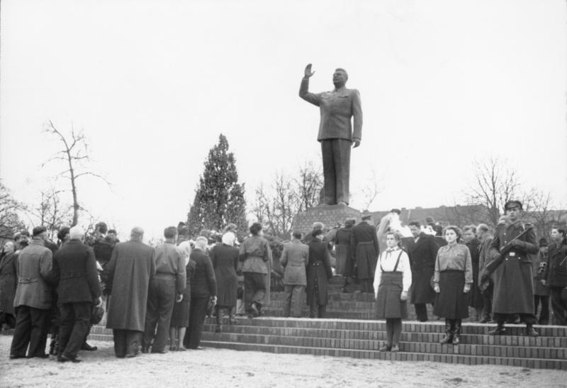 Riesa, Stalindenkmal Zentralbild/Siegert 4.3.1954 Stalindenkmal in Riesa enthüllt Am Vorabend des Todestages von J.W. Stalin, am 4. März 1954, wurde auf dem Puschkinplatz in Riesa das erste in Deutschland hergestellte Stalindenkmal enthüllt. Die vier Meter hohe Bronzestatue wurde nach dem Entwurf des Dresdener Bildhauers Dr. Friedrich Rogge in der Kunstgießerei des Lauchhammerwerkes angefertigt. UBz: Delegationen der Parteien und Massenorganisationen sowie Delegationen aus den Betrieben schmückten die Stätte mit Kränzen.